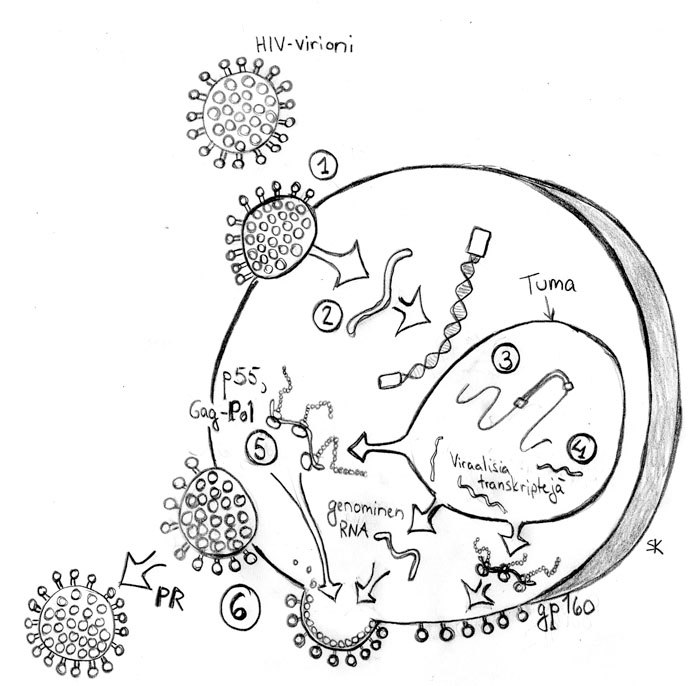 HI-viruksen elinkierto